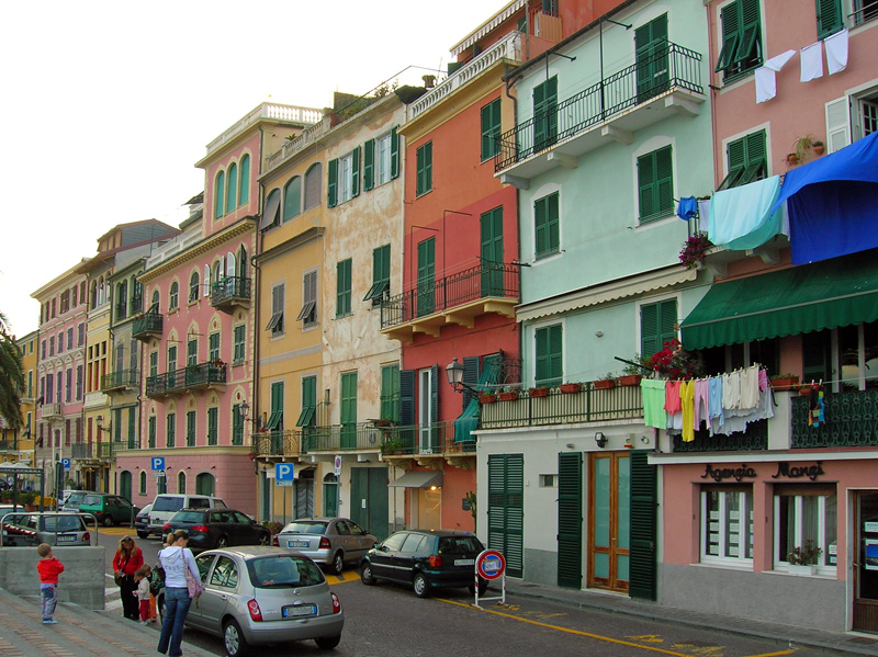 Palazzata riva mare di Celle Ligure (SV)